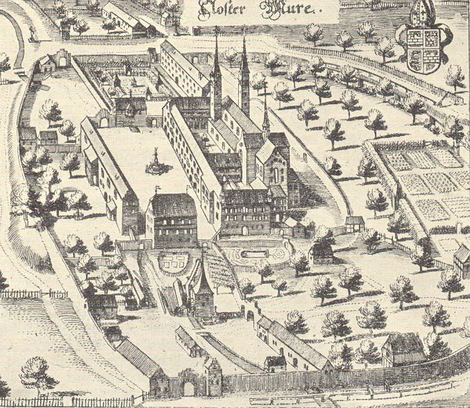 Ansicht des Klosters Muri im Jahr 1642, Topographia Helvetiae, Rhaetiae et Valesiae.